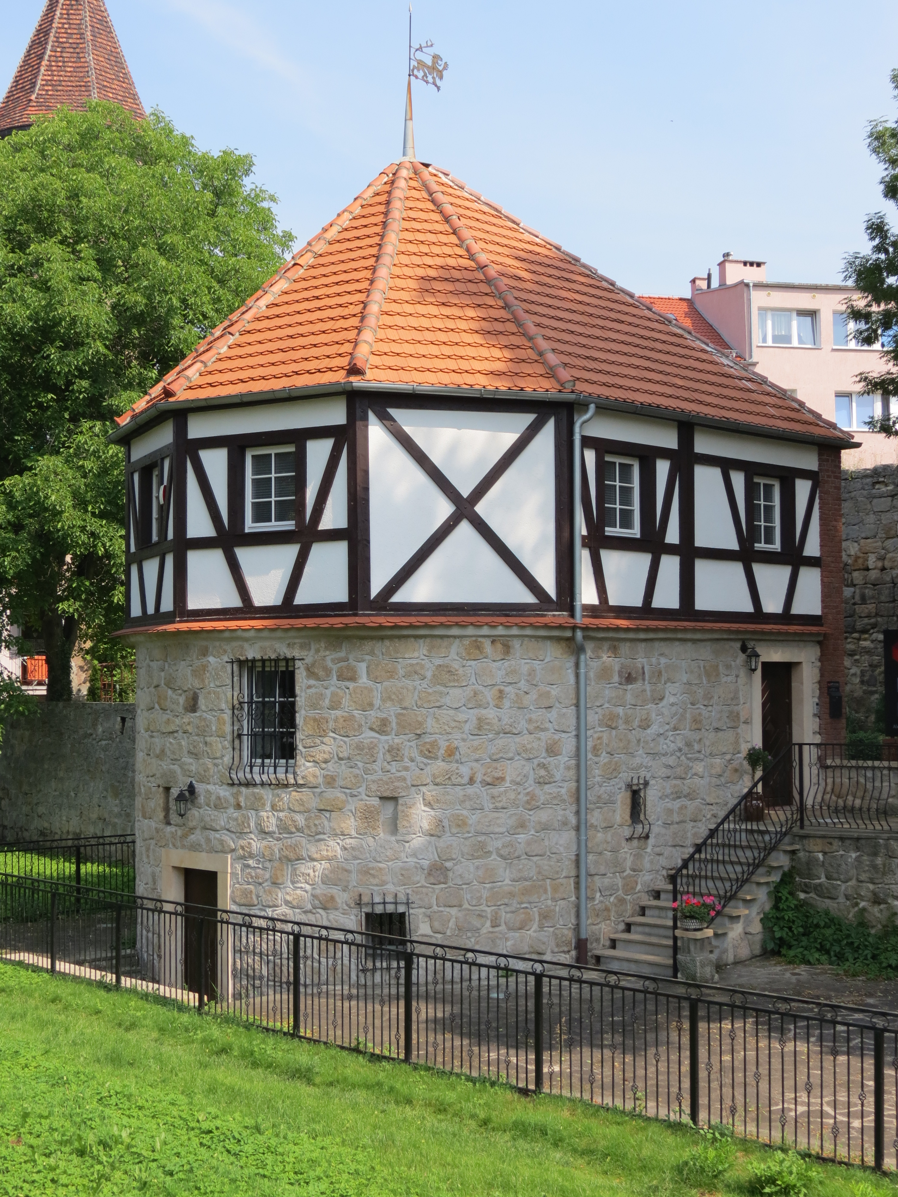 Lwówek Śląski, mury obronne z basztami, XIV/XV